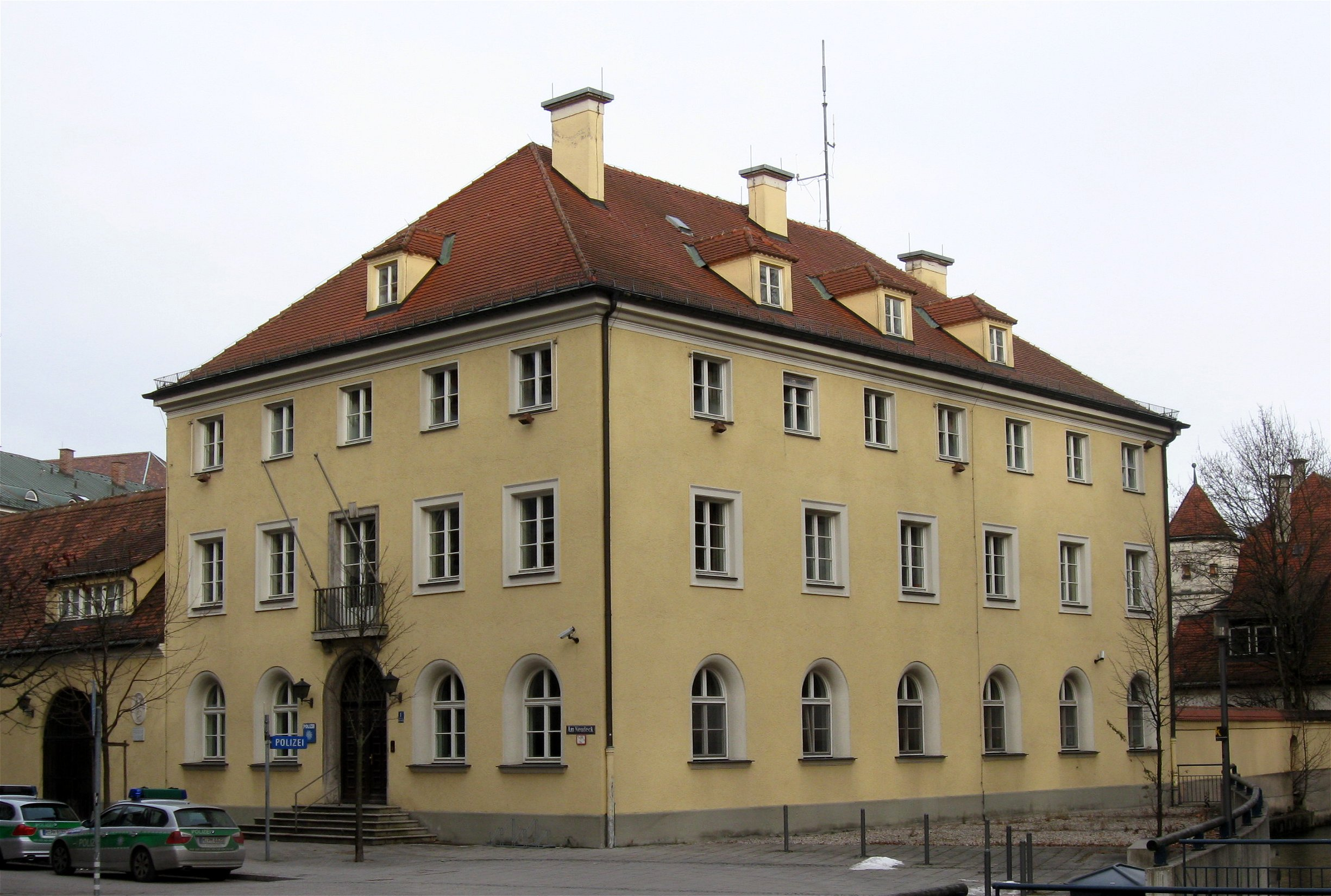 Am Neudeck 1; ehem. Bayerische Landesimpfanstalt, barockisierender Gruppenbau um Hof, 1903-04 von Hermann Buchert. Zugehörig am Nordende malerische Villa mit Türmchen; heute „Polizeiinspektion München 21 (Au)“